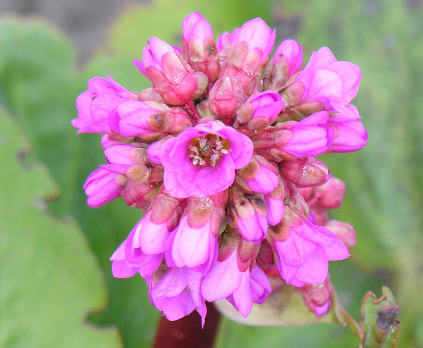 Storalapė bergenija (Bergenia crassifolia) Šeima. Uolaskėliniai (Saxifragaceae) Fotografavo Algirdas, 2006 m. balandžio 29 d., Lietuva.